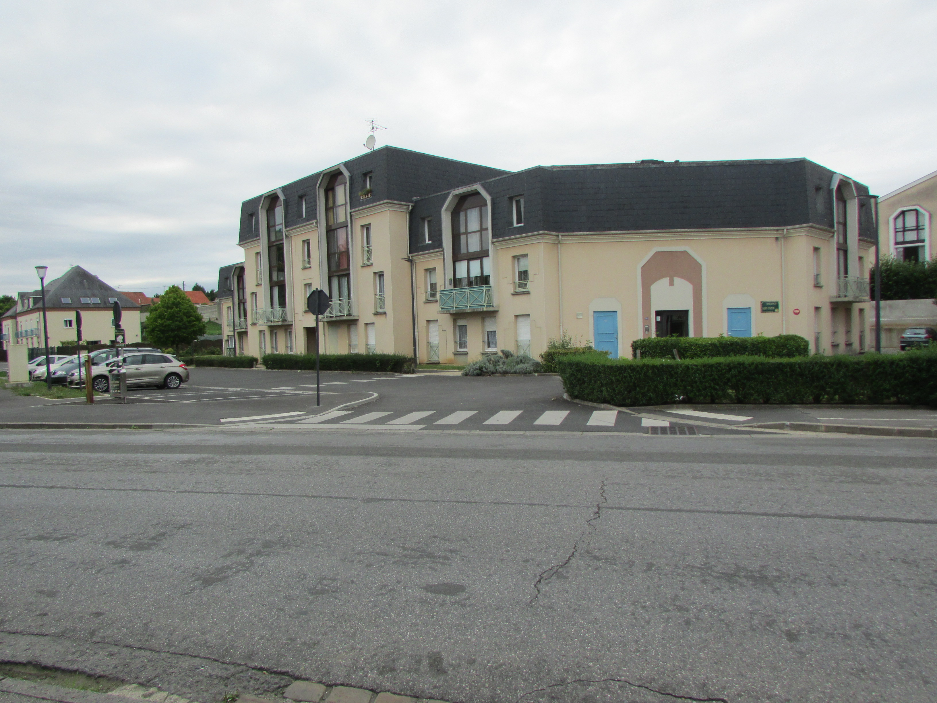 Emplacement de la gare de Rocourt.